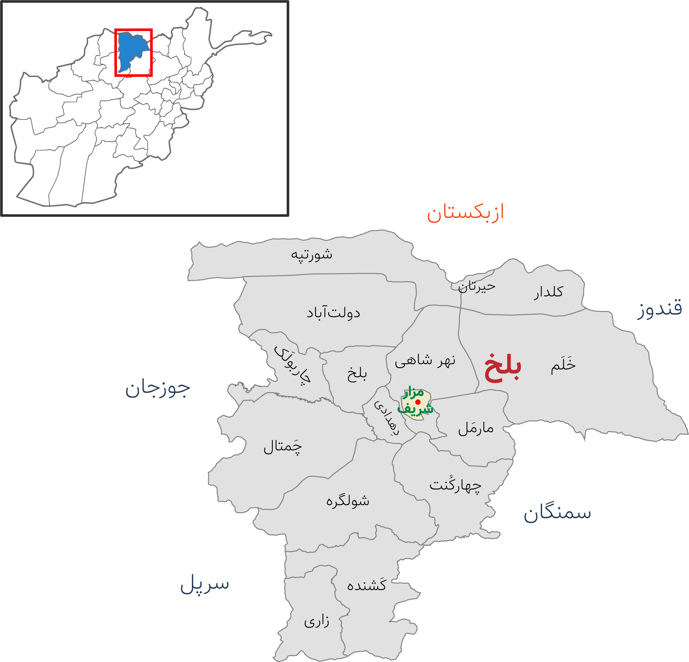 نقشه ولایت بلخ